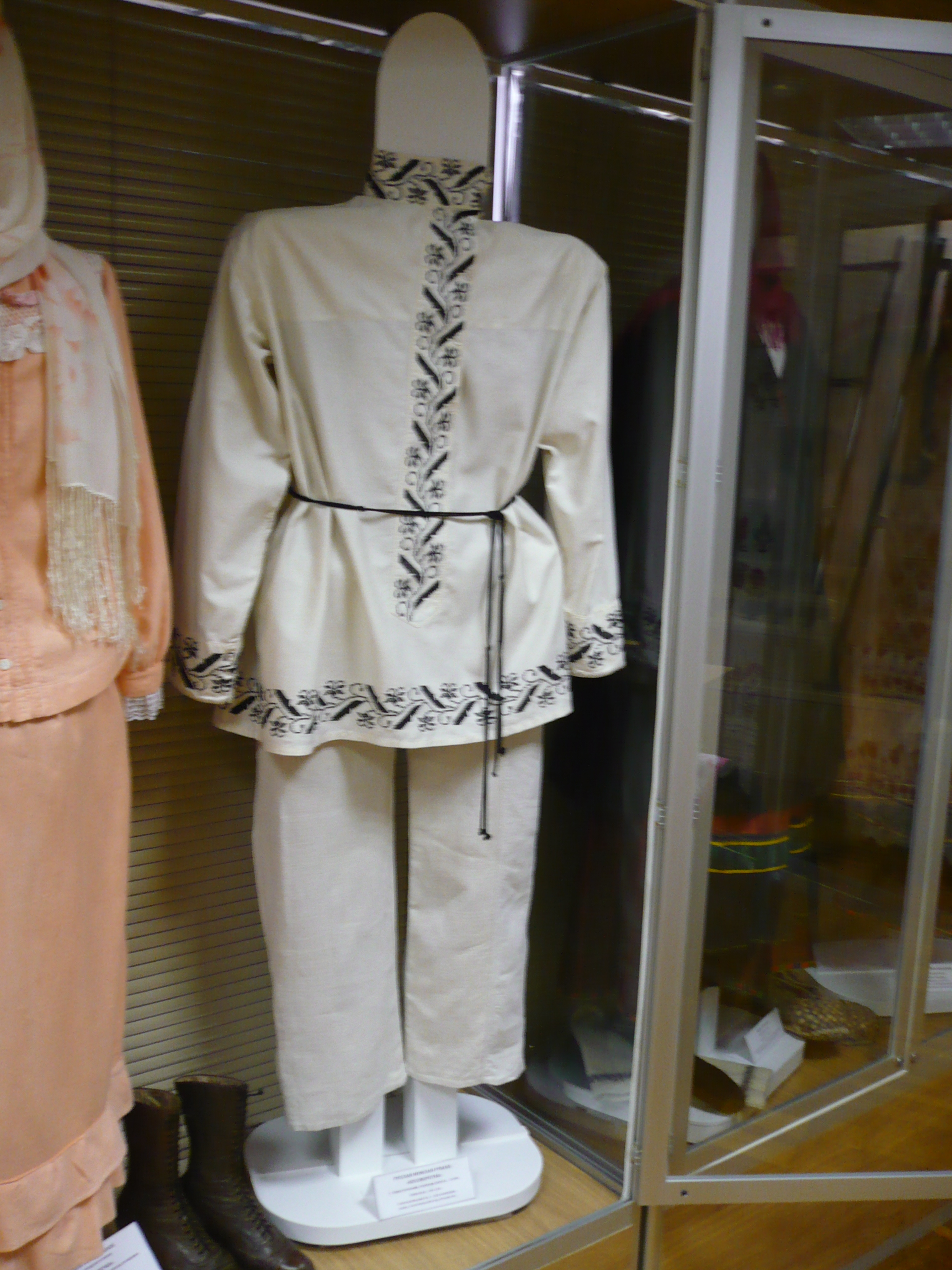 Старооскольский народный костюм. Стенд Д. Русский музей (Пед. колледж). Белгородская область, 2008.